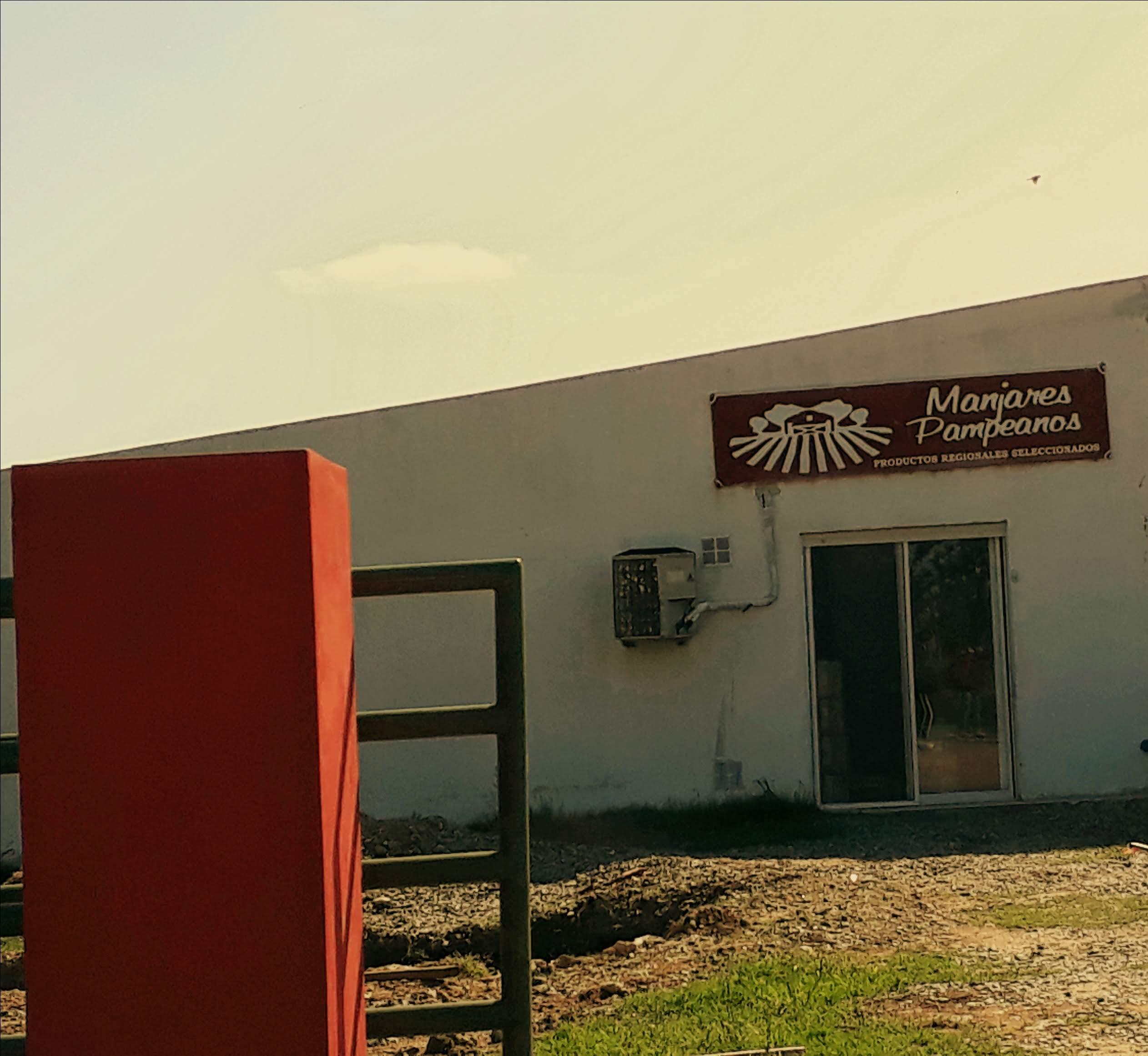 fabrica de queso ubicada en el SIPLA de Rauch